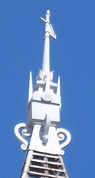 Acercamiento de la espada Excalibur ubicada sobre el torreón principal del Castillo Pittamiglio, vista desde la rambla.